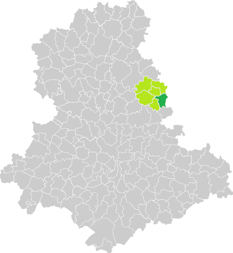 Carte de situation de la commune de Jabreilles-les-Bordes (en vert foncé) dans le votre Canton (en vert clair) sur une carte des communes de la Haute-Vienne